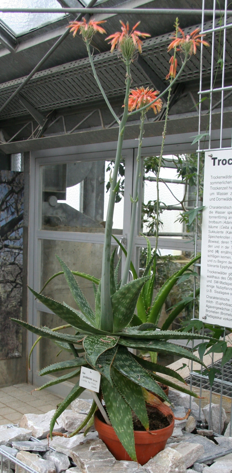 Aloe grandidentata im Botanischen Garten Bayreuth